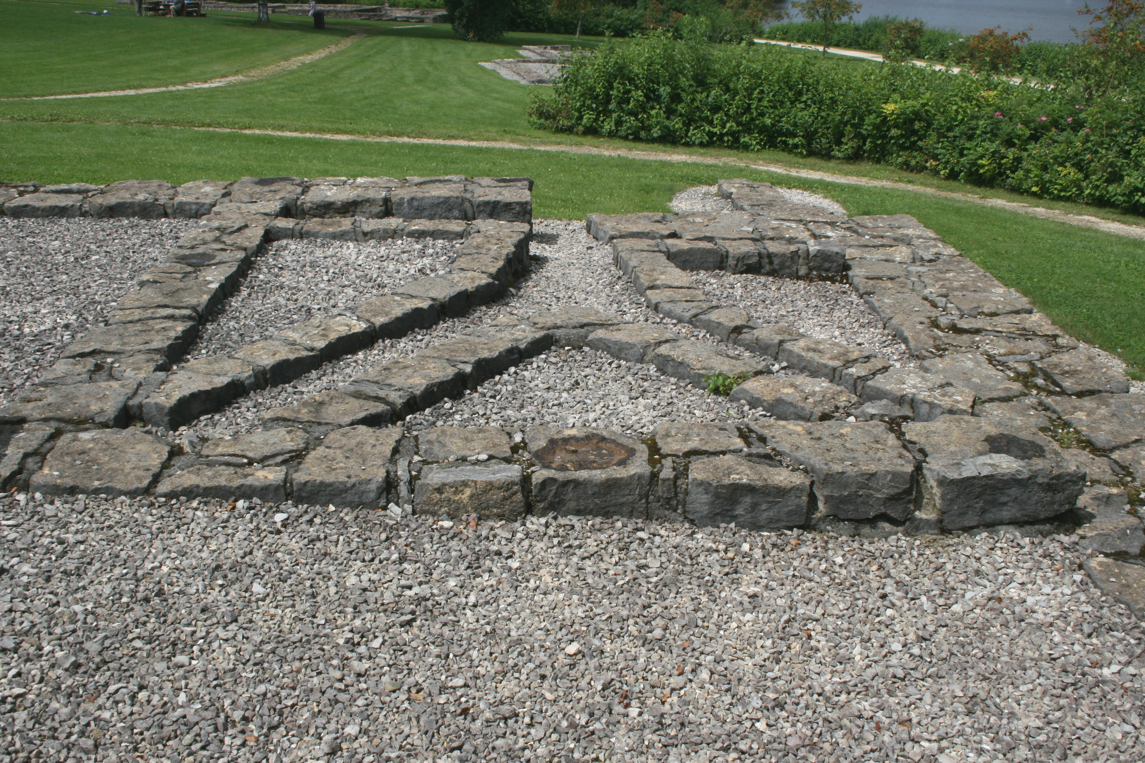 Vicusgebäude im Kastell Buch. Detailansicht der Kanalheizung.